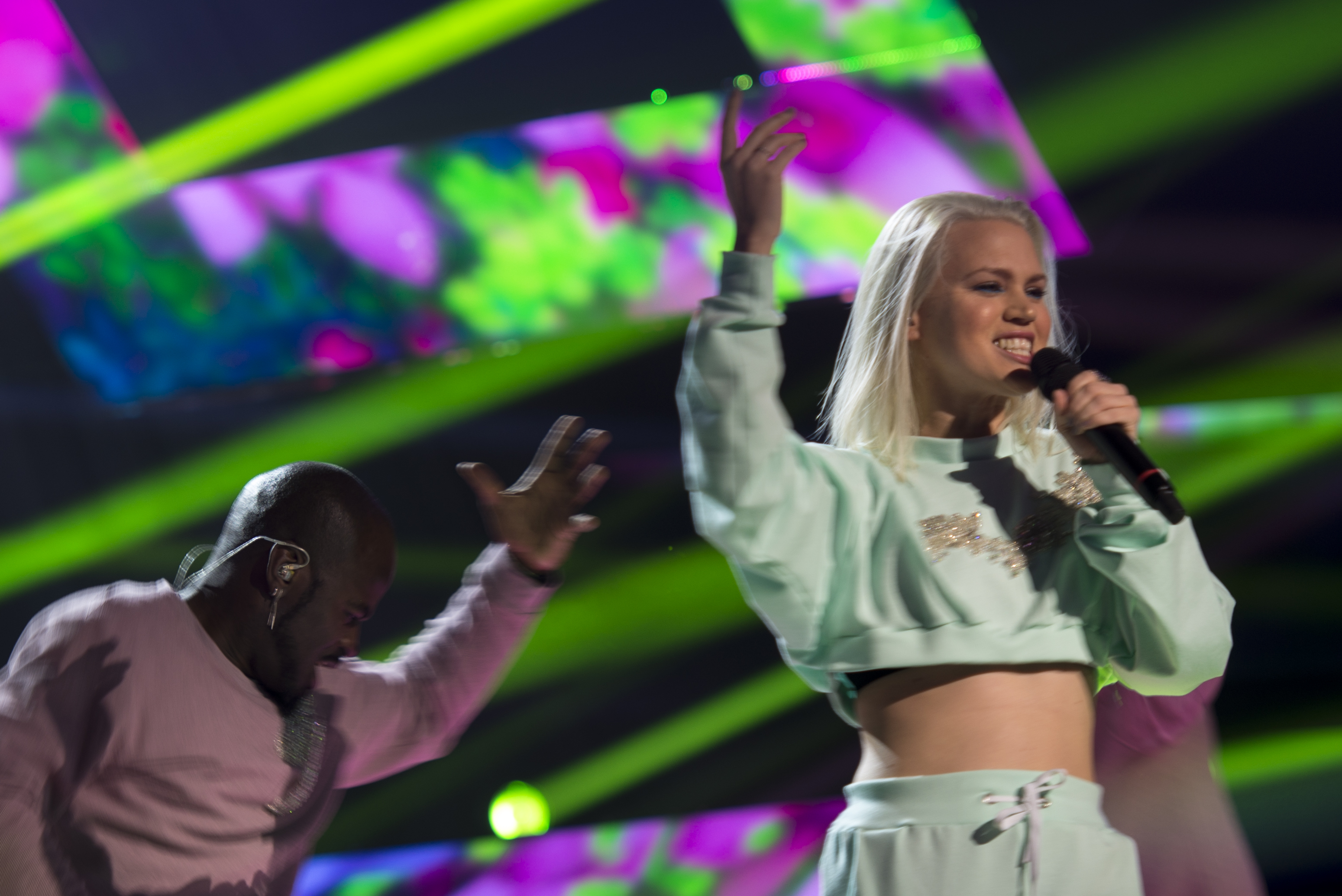 Ace Wilder på en repetition under första deltävlingen av Melodifestivalen 2017 i Göteborg.